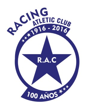 Escudo conmemorativo al centenario del Racing A. Club de Olavarría